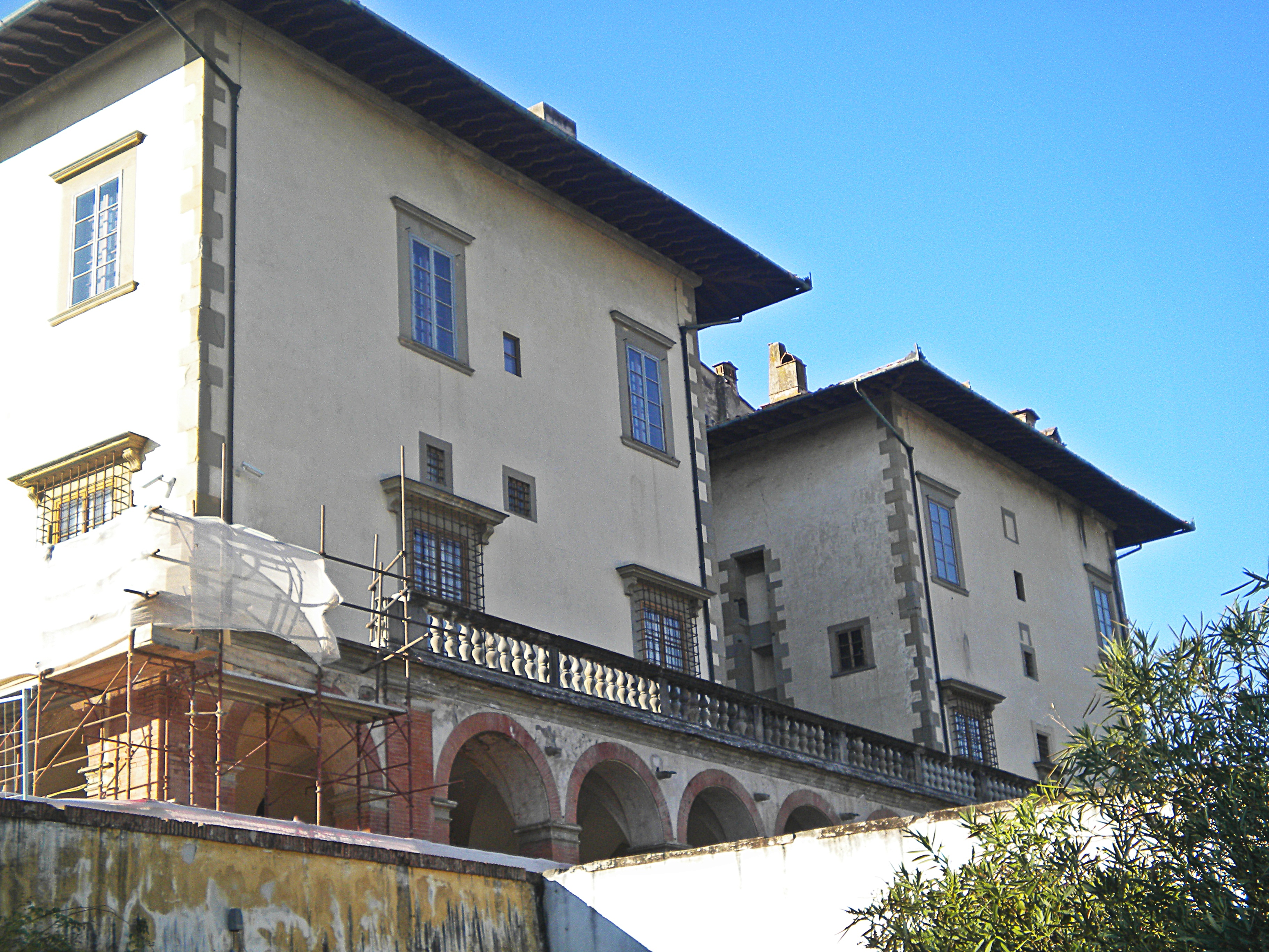 villa